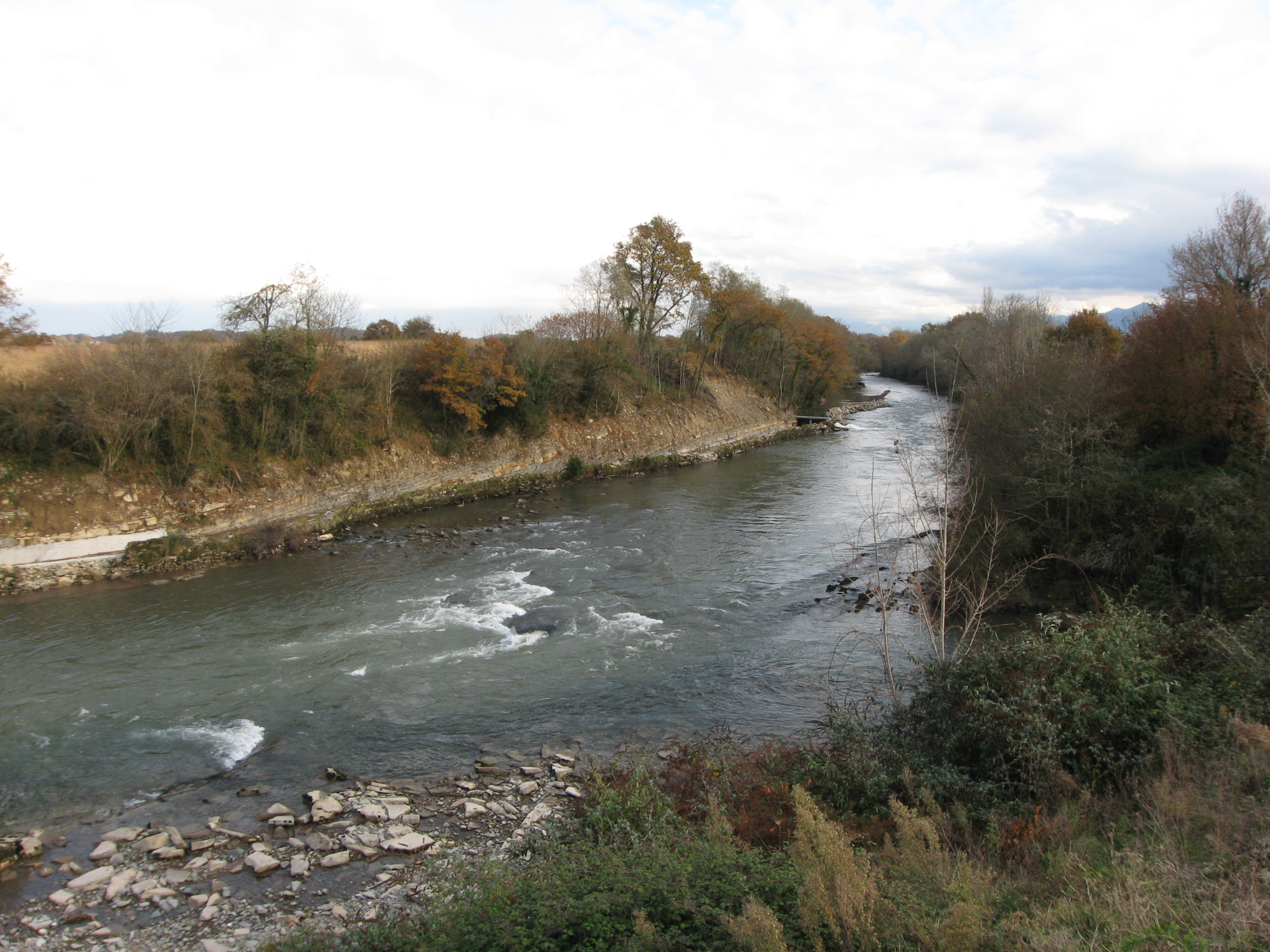 Canal d'alimentation d'un ancien moulin sur le Gave d'Oloron à Moumour (Pyrénées-Atlantiques) (Pyrénées).